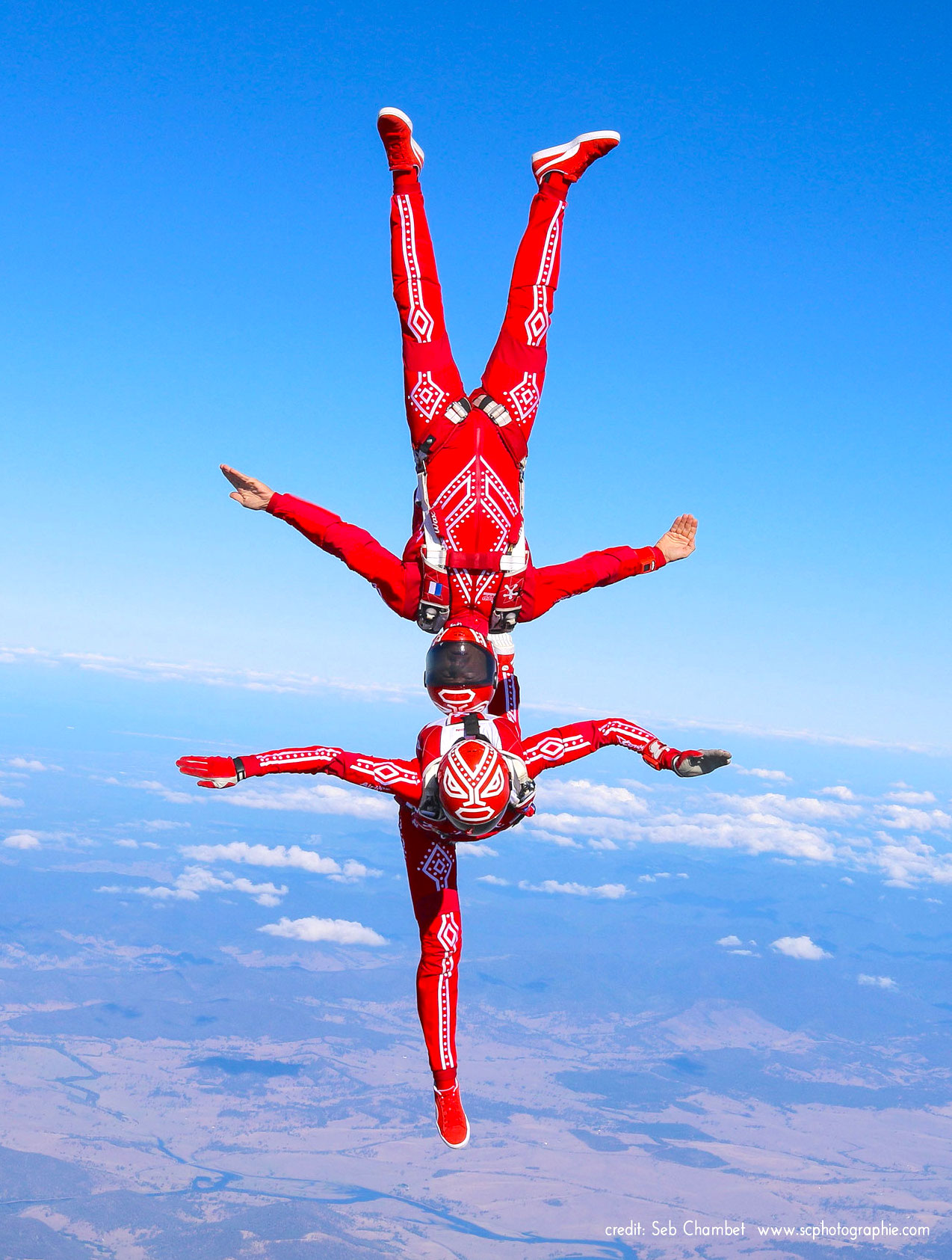 Greg Crozier, Karine Joly et Baptiste Welsch Equipe de France 2018 Championne du Monde Photo de l'entraineur Sebastien CHAMBET